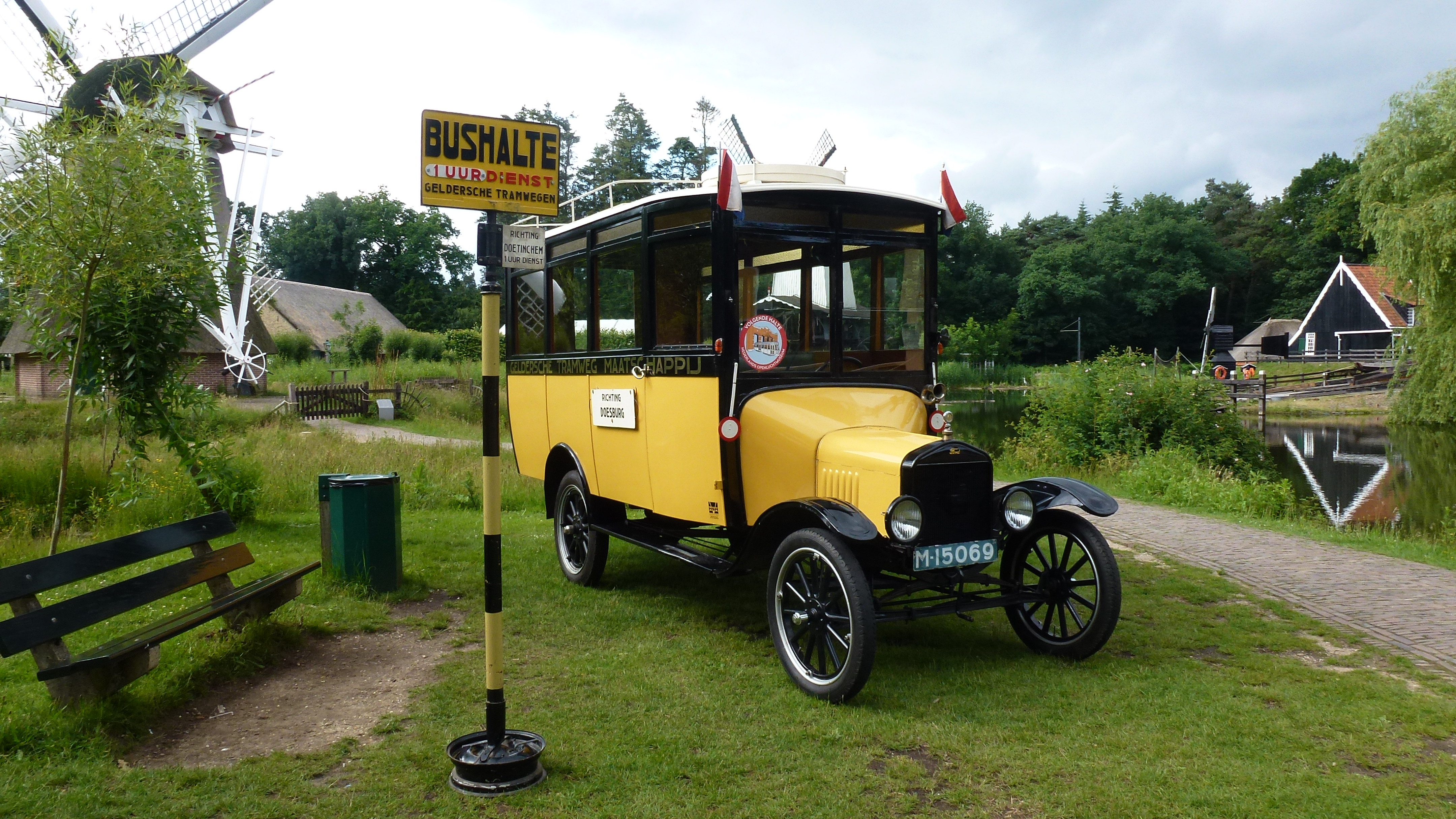 T Fort autobus uit 1923. Motor/chassis: Ford (model T), Ontario (Canada). Carroserie: Verheul (Waddinxveen), Lengte: 4,90 meter. Gewicht (leeg): 1.670 kilogram. Zitplaatsen: 8. Nieuwe carrosserie in 1951. De Ford behoort tot de collectie van Stichting Historisch Streekvervoer Achterhoek. Fotolocatie: Nederlands Openluchtmuseum in Arnhem